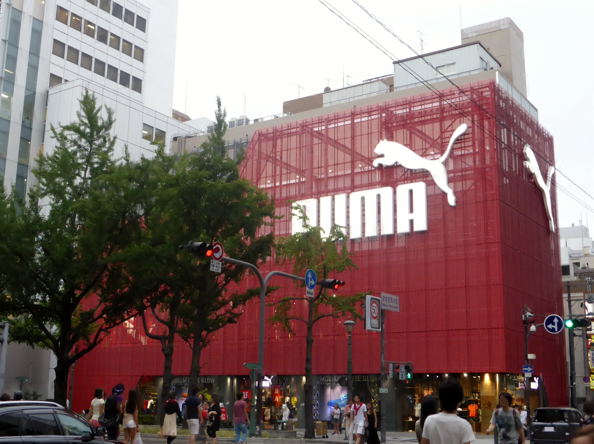 プーマストア大阪を撮影。